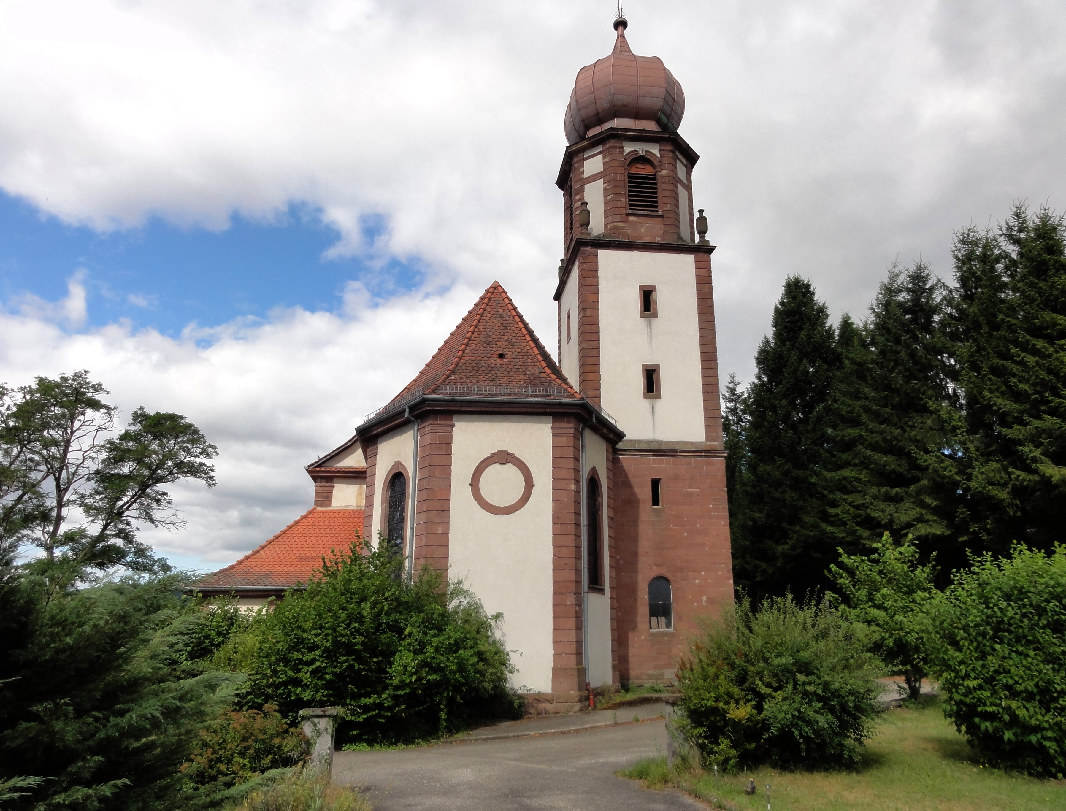 Alsace, Bas-Rhin, Wingen-sur-Moder, Église Saint-Félix-de-Cantalice (XXe): .